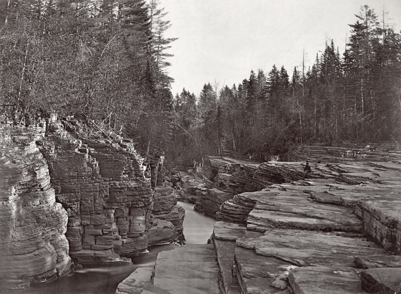 Natural Steps (Montmorency River). Formation géologique de calcaire gris stratifié sur le parcours de la rivière Montmorency, près de Québec (Québec).